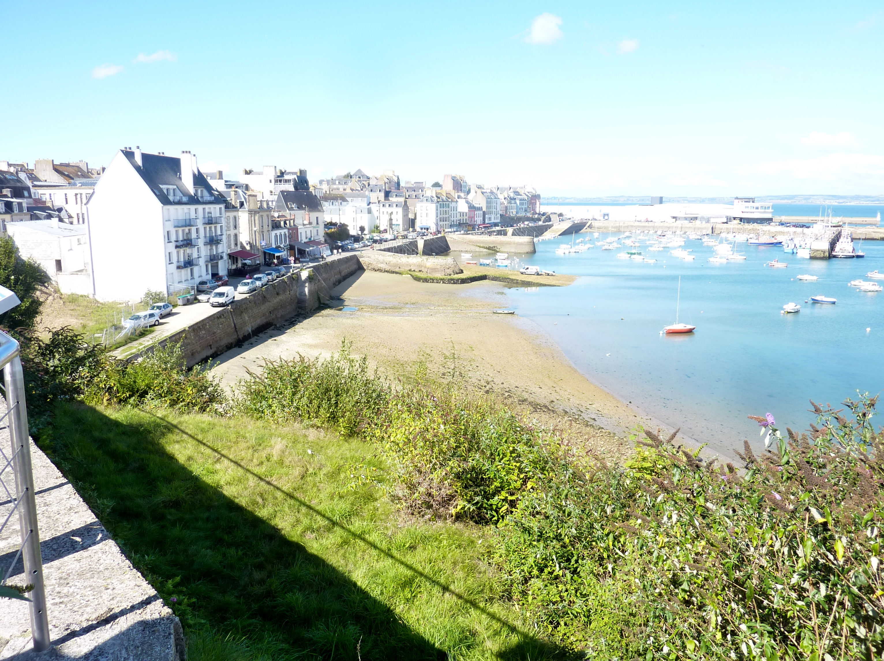 Douarnenez : les quais du Petit Port et du grand Port et le port de pêche du Rosmeur